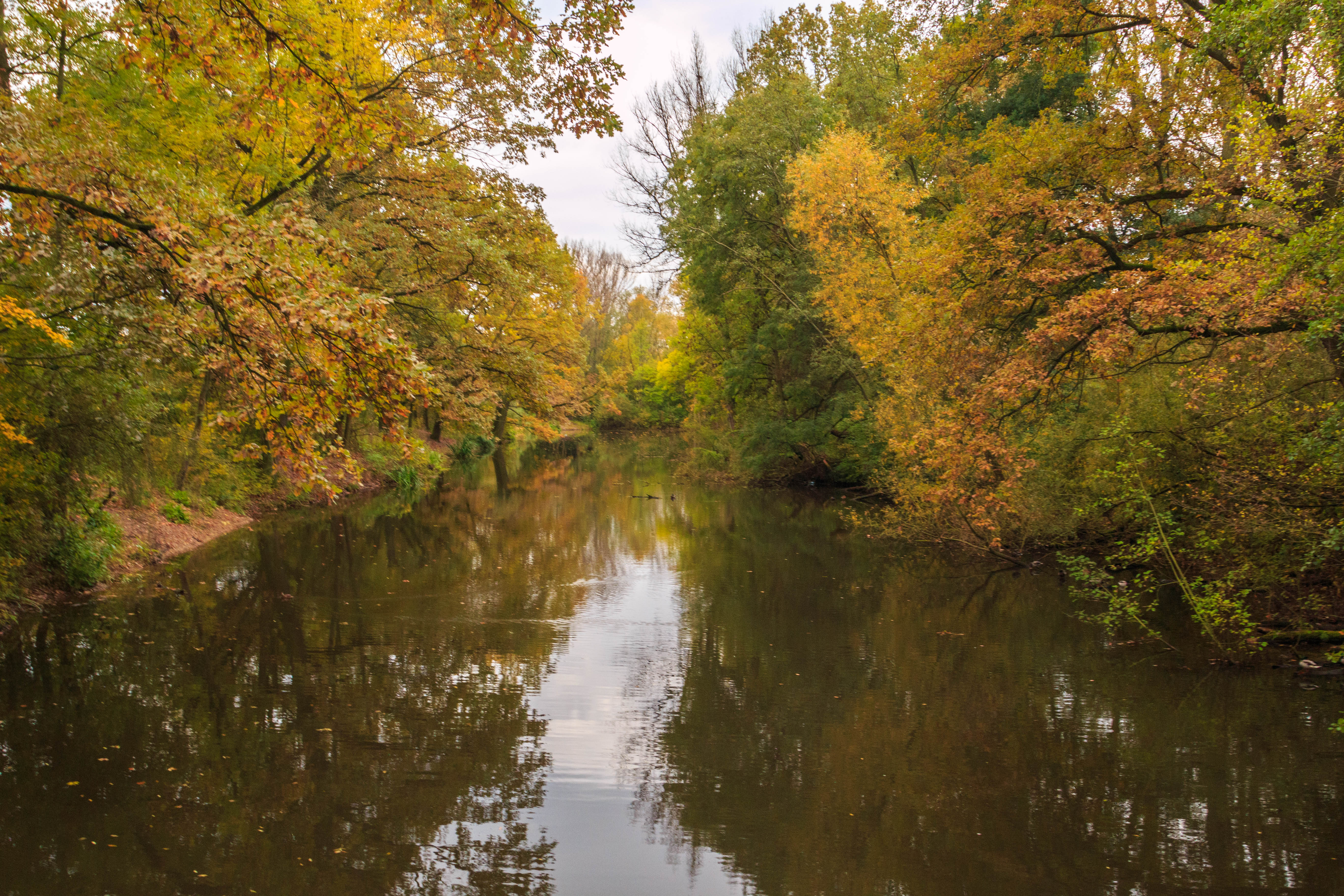 Revitalizované mrtvé rameno Labe v Polabinách v říjnu 2017